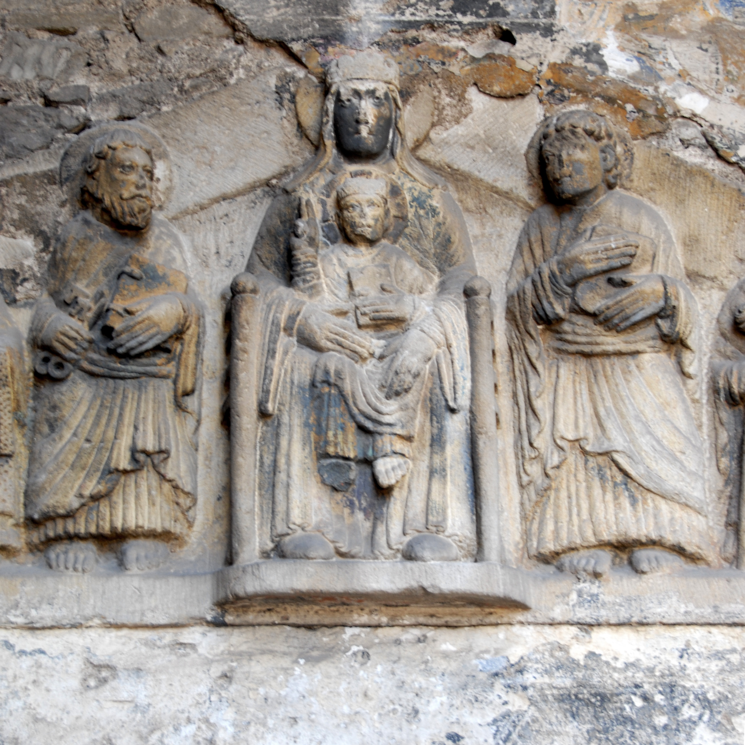 Mozat, südl. Querhaus, Portalsturz, Mittelstück